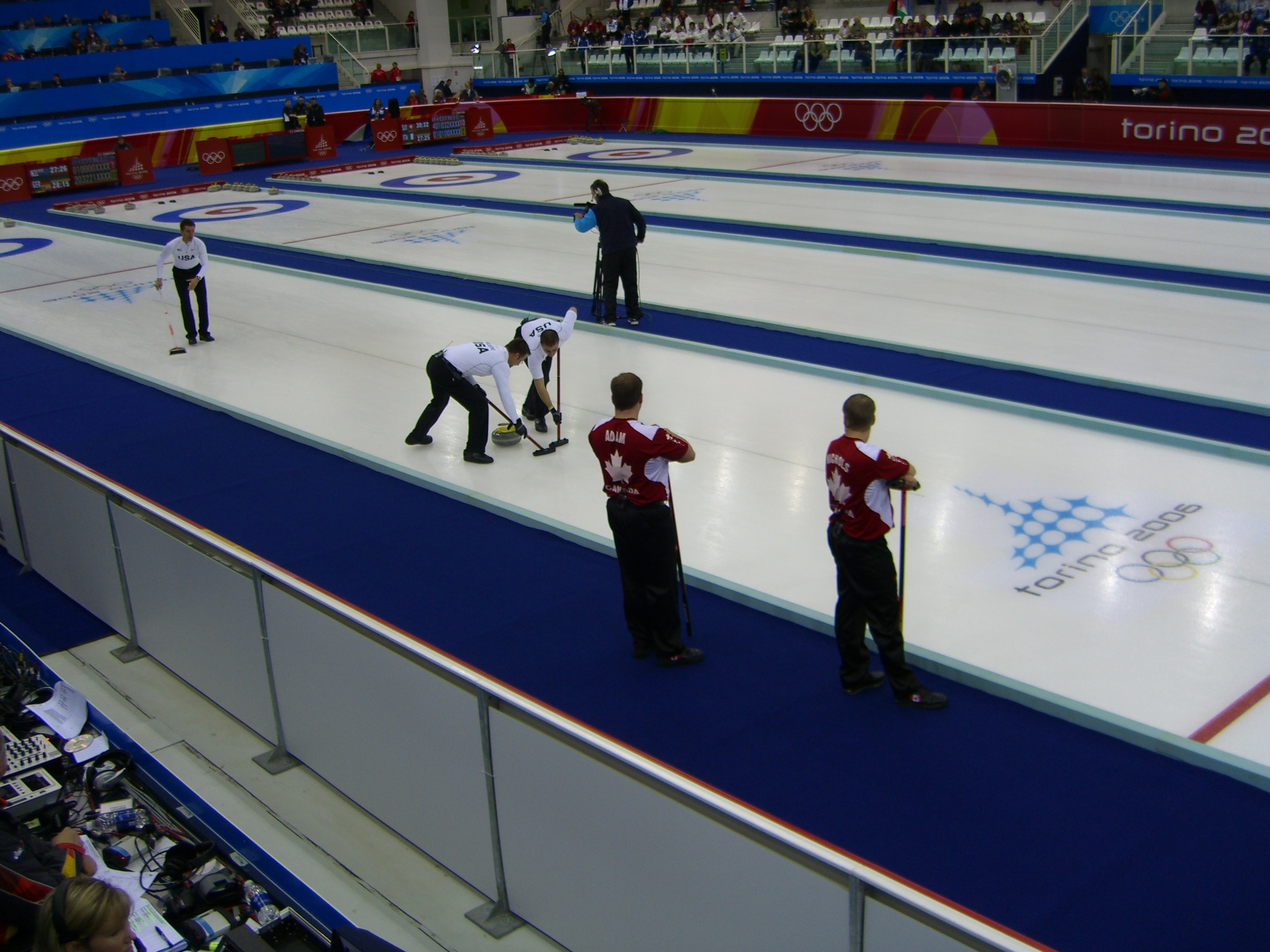 Curling nelle olimpiadi invernali di Torino del 2006. Pinerolo, Palaghiaccio, interno.